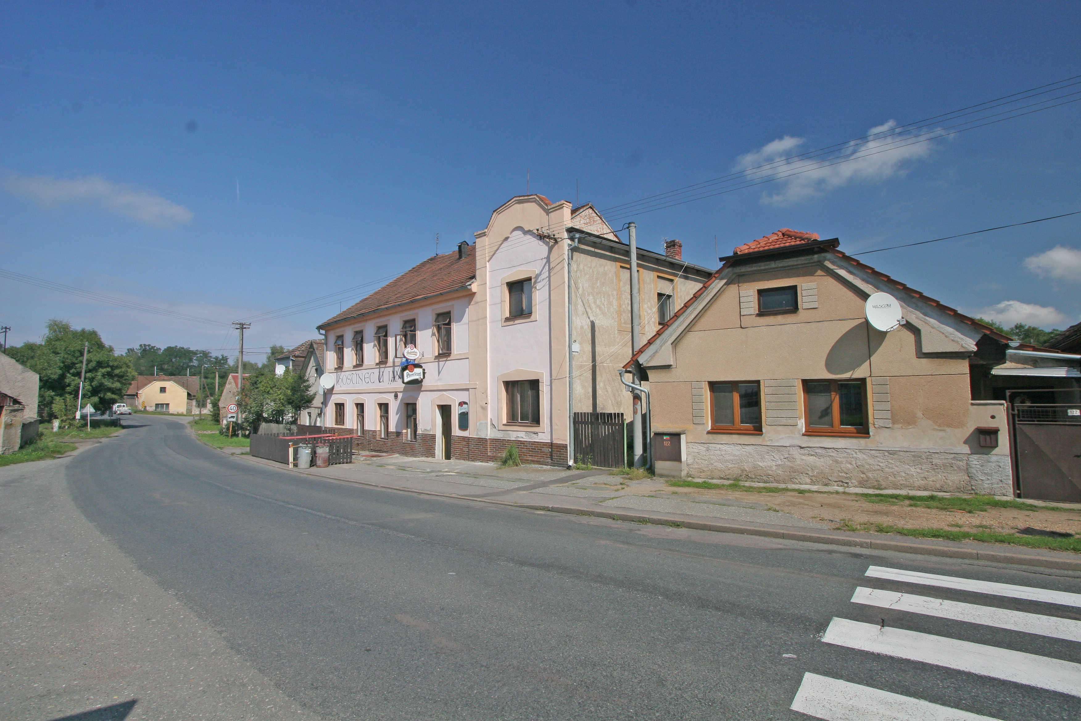 Kojice čp. 84